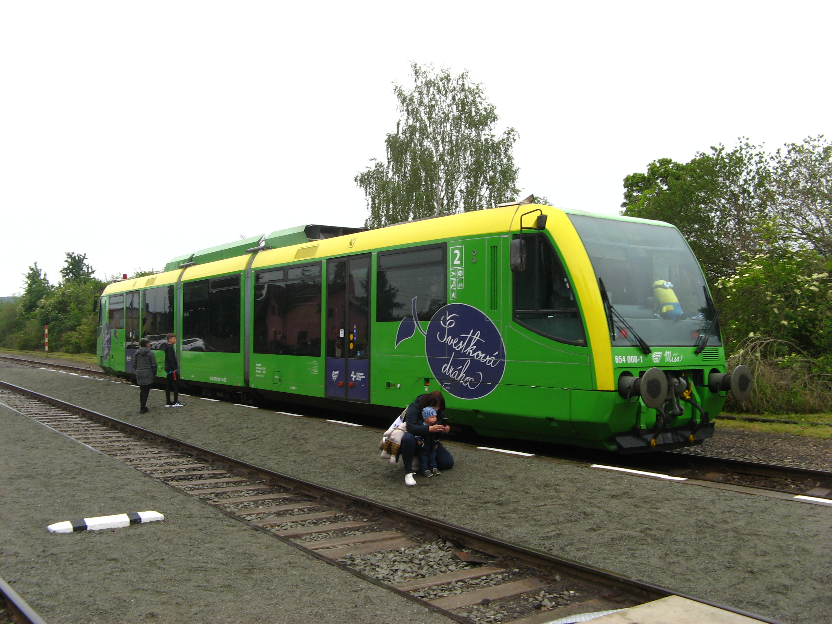 Motorová jednotka německé řady 654 (RegioSprinter) ve stanici Chotiměř v den zahájení víkendového provozu společnosti AŽD Praha